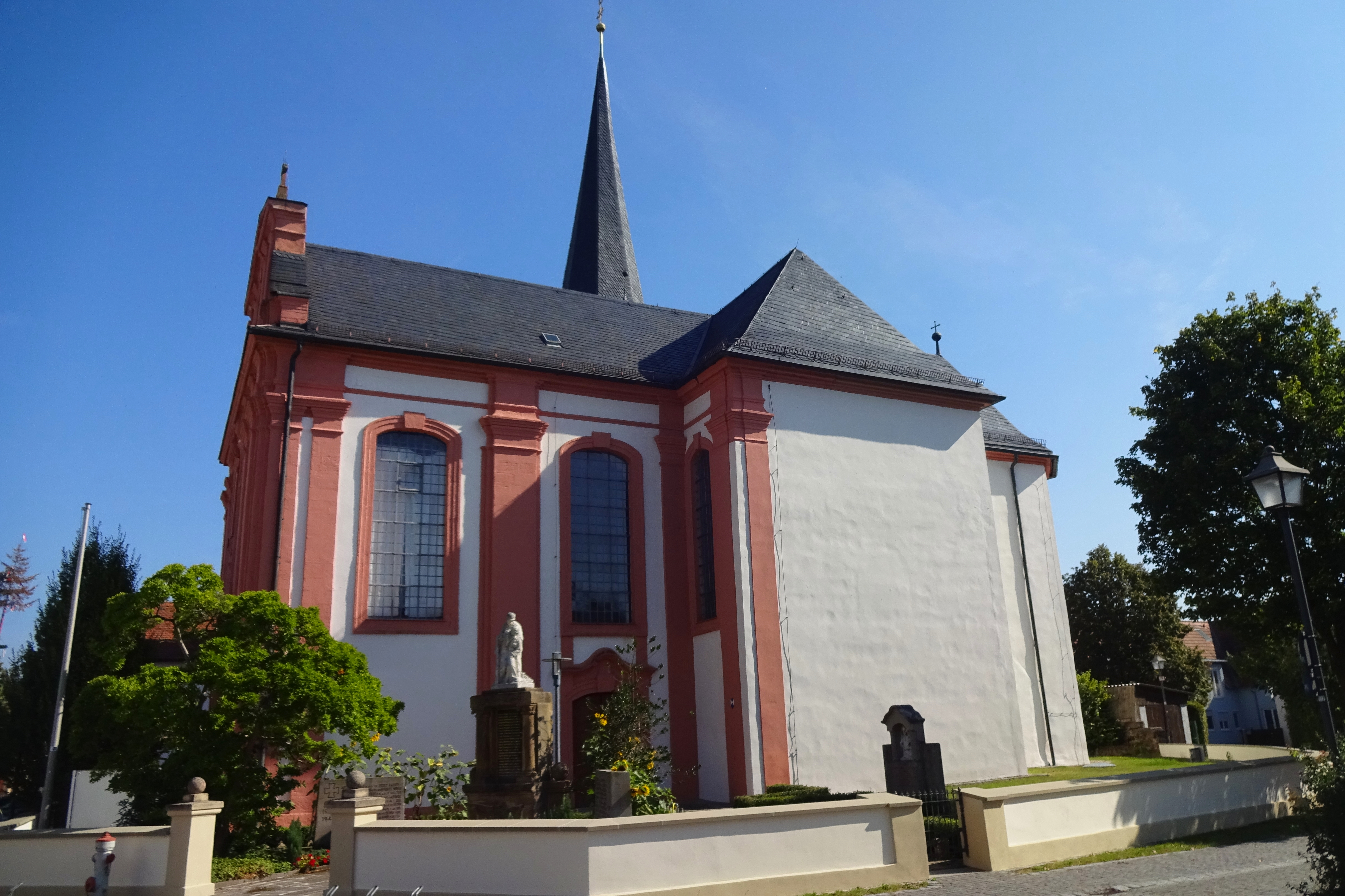 Die katholische Pfarrkirche Mariae Geburt in Pettstadt.